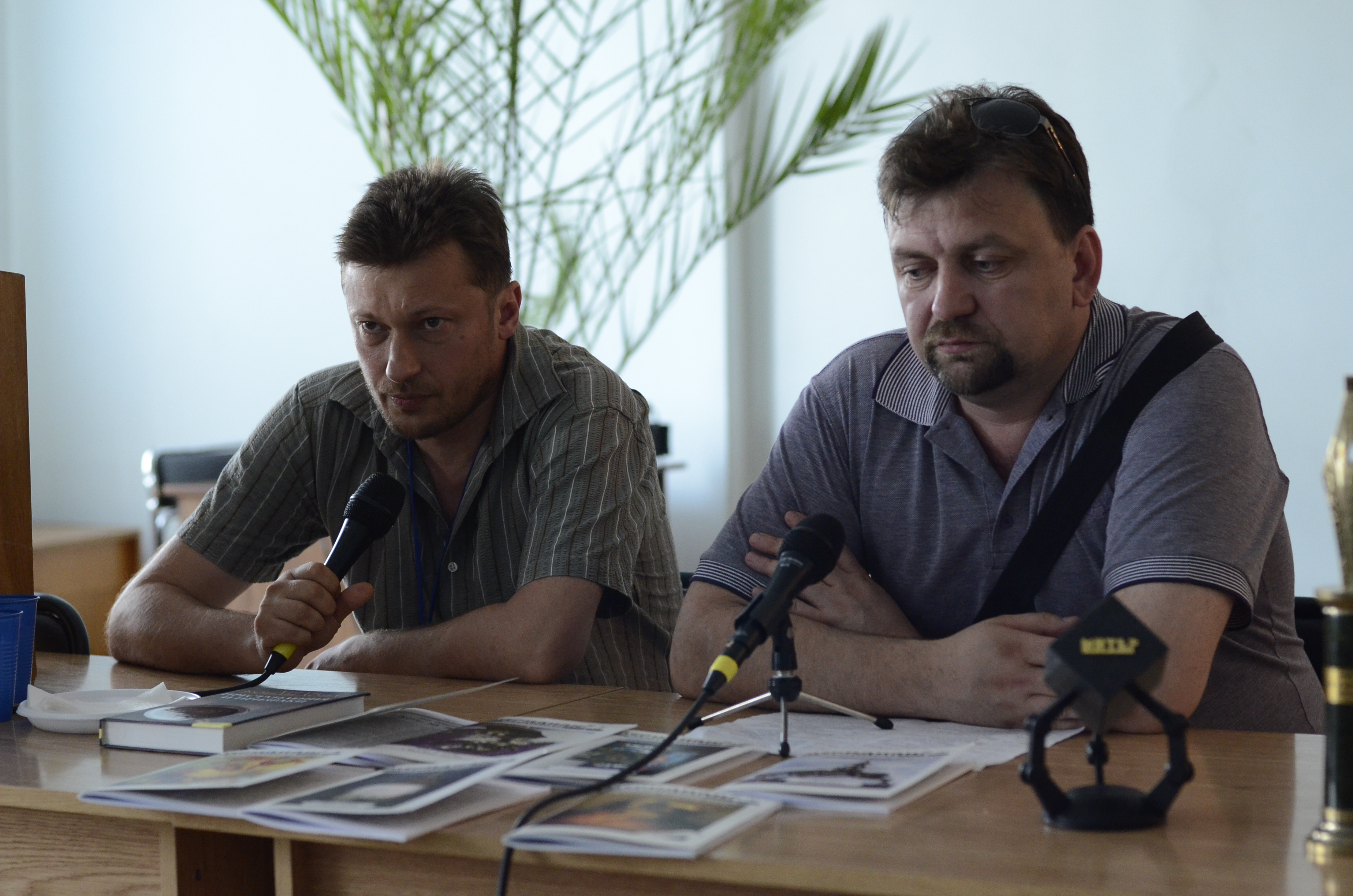 Конференция «Чумацкий Шлях» («Всеукраинский съезд Фантлаба-2011») в Донецке.